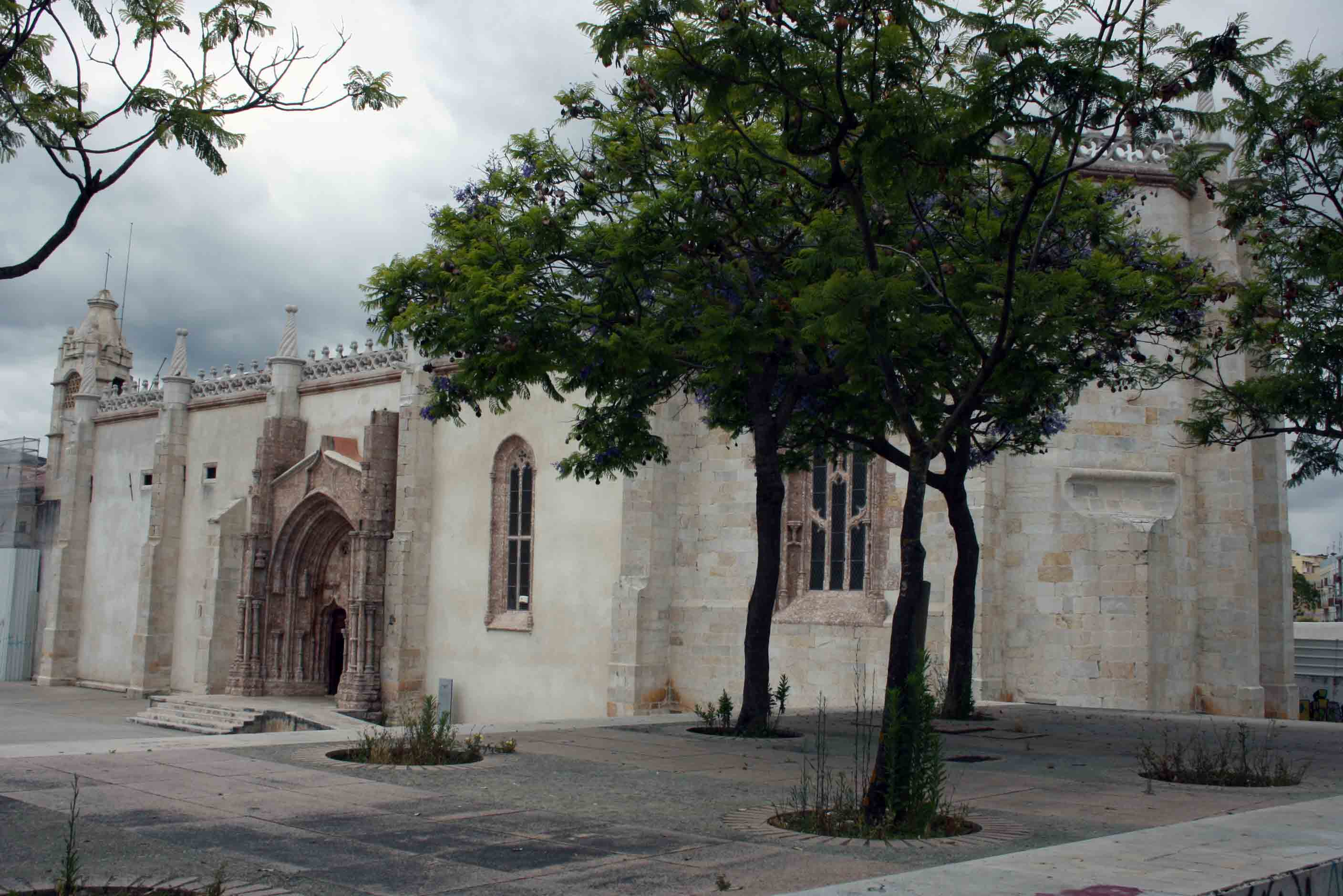 SCMS - Igreja de Jesus